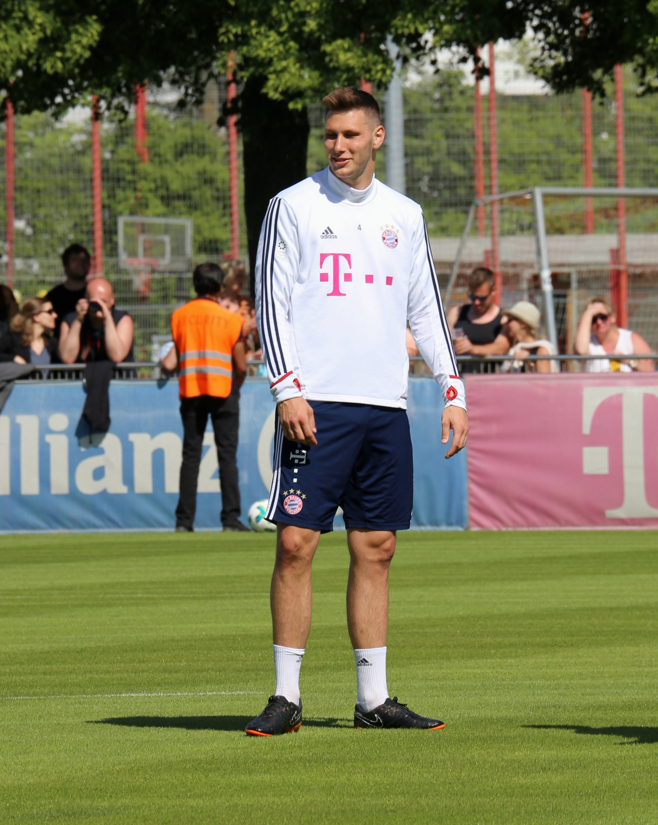 Niklas Süle, am 8. Mai 2018 beim Training auf dem Gelände des FC Bayern München